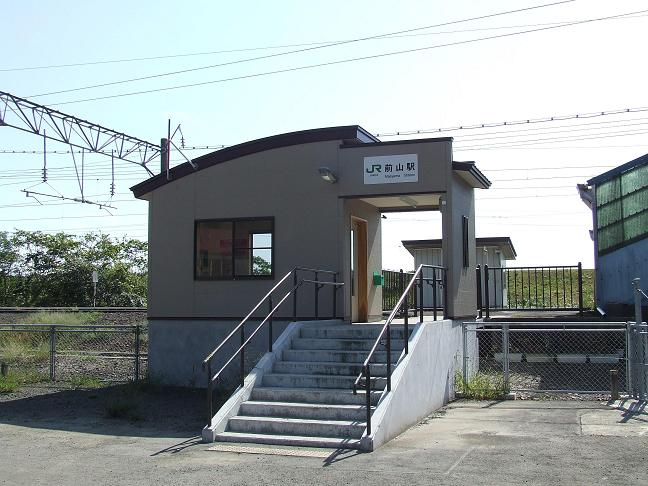 JR前山駅